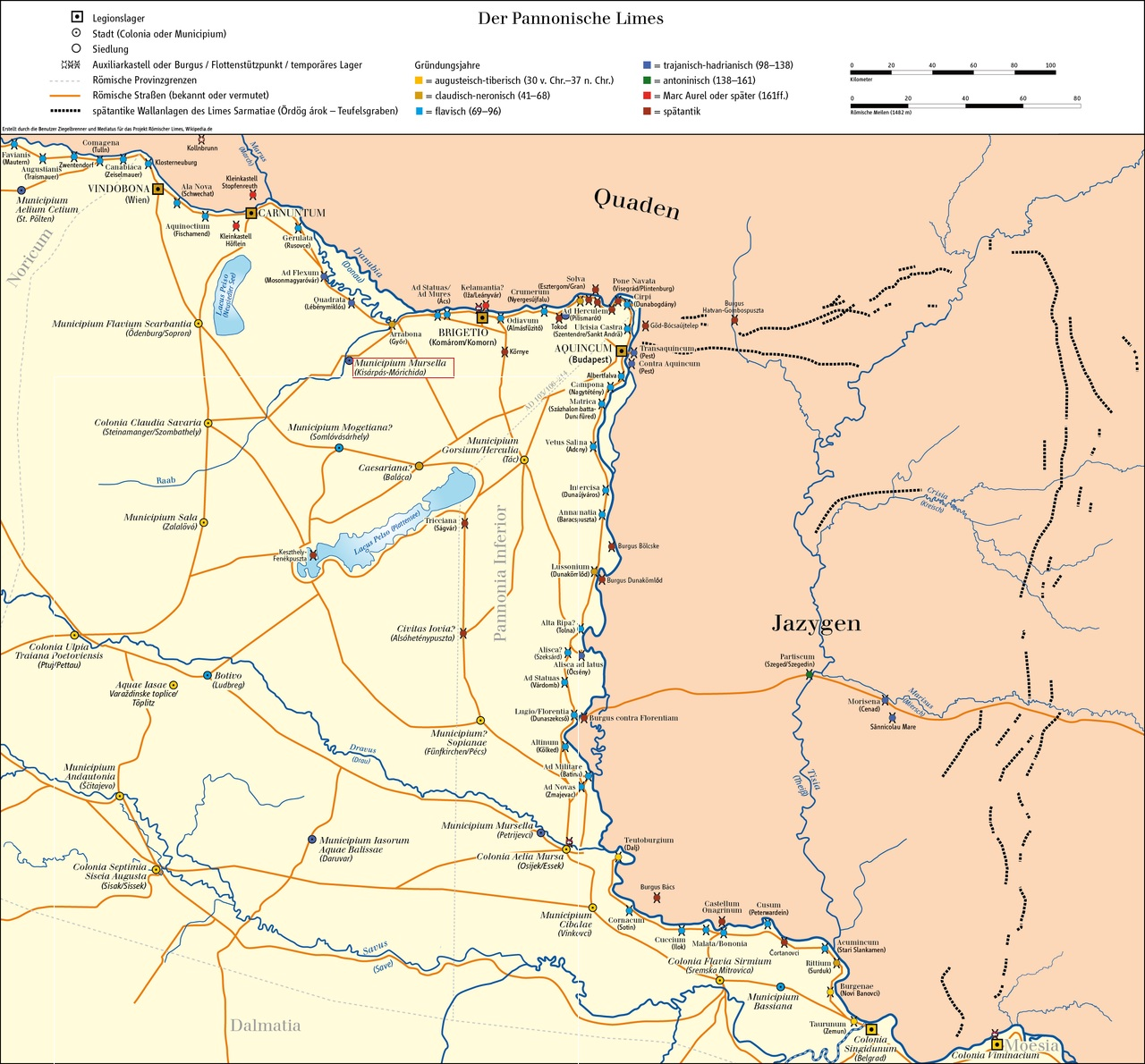 Karte des Pannonischen Limes, Municipium Mursella mit roter Umrandung